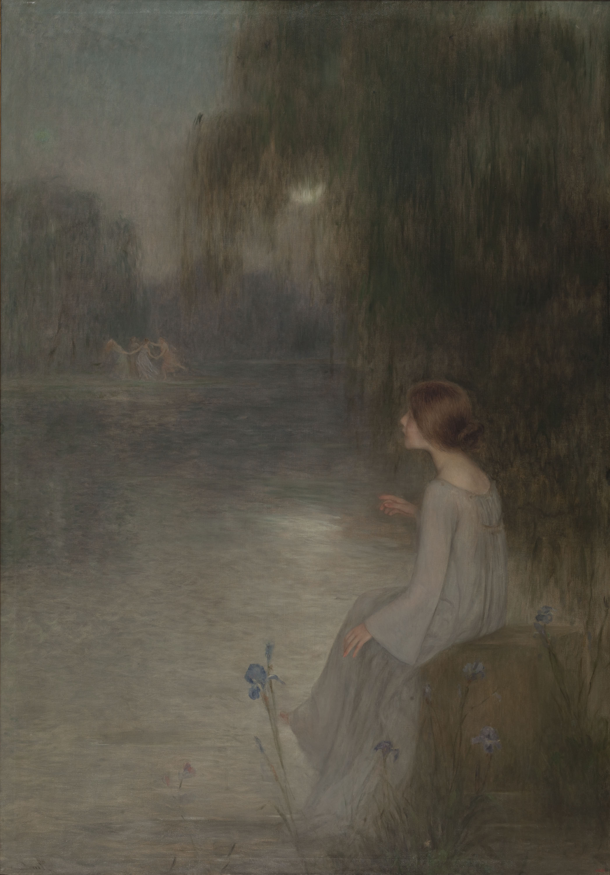 Ensueño (1897) de Joan Brull, Museo Nacional de Arte de Cataluña, Barcelona.